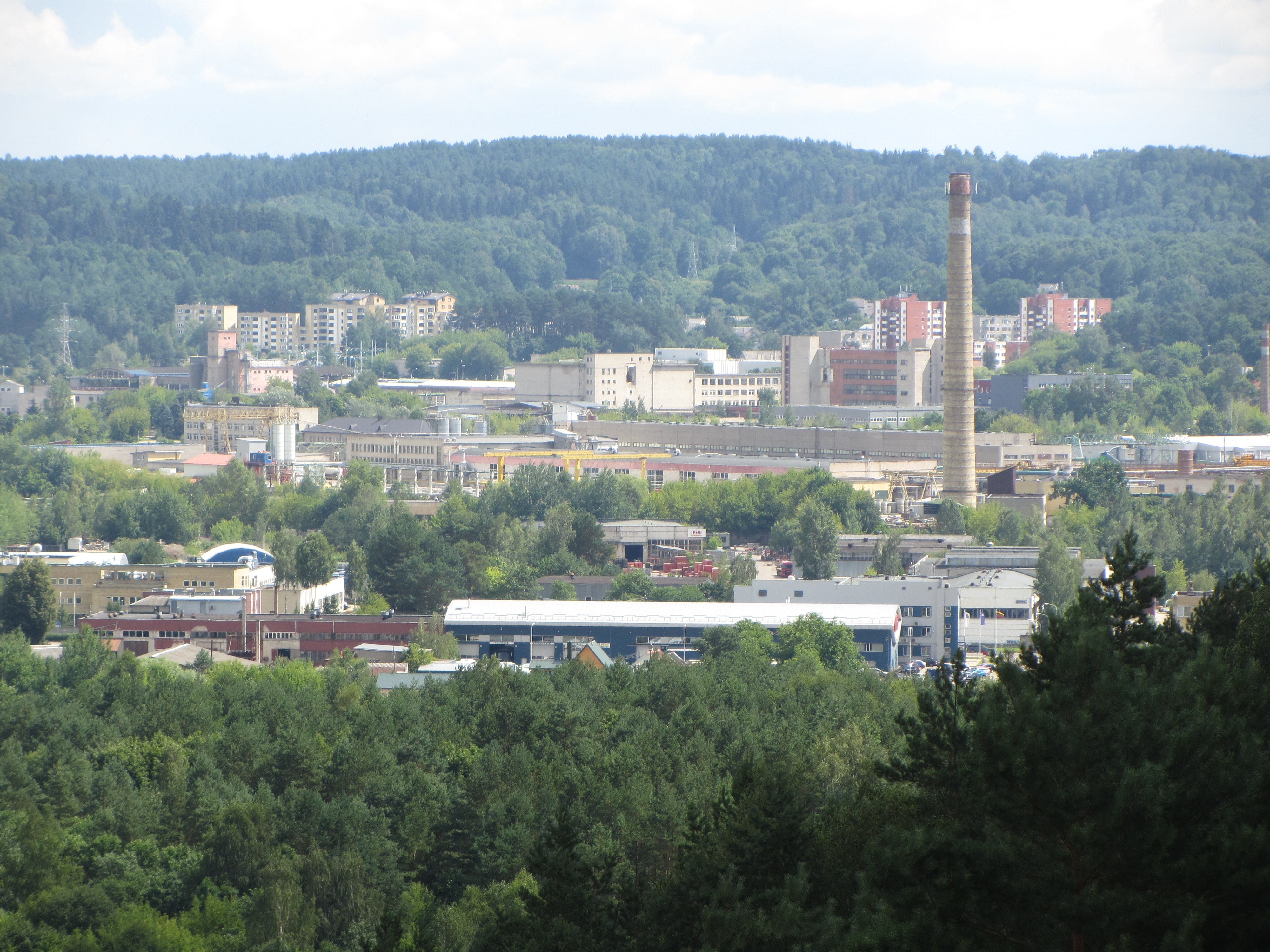 Paneriai, Vilnius, Lithuania